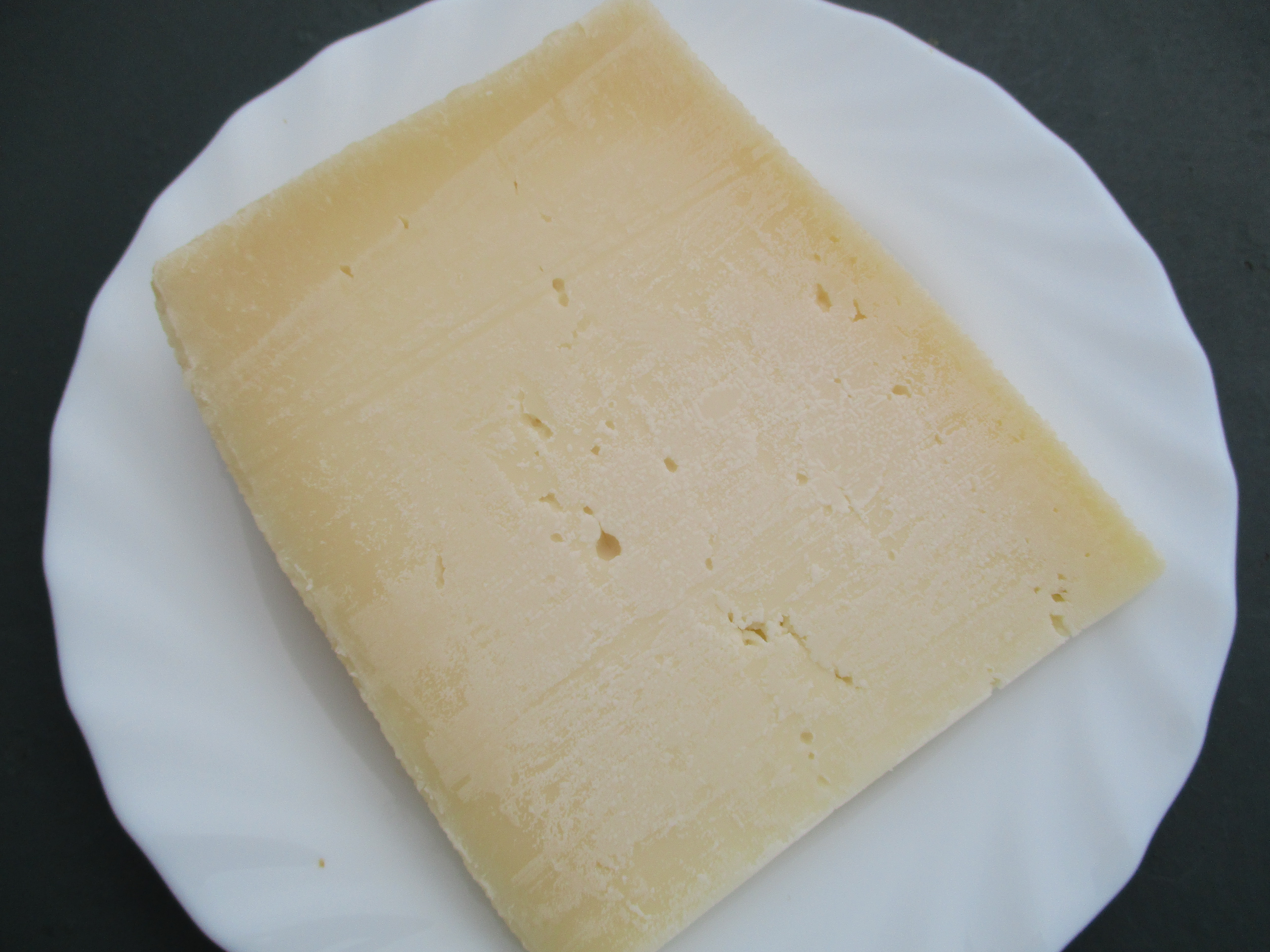 Fromage asagio allevo au lait de vache, originaire du nord-est de l'Italie.